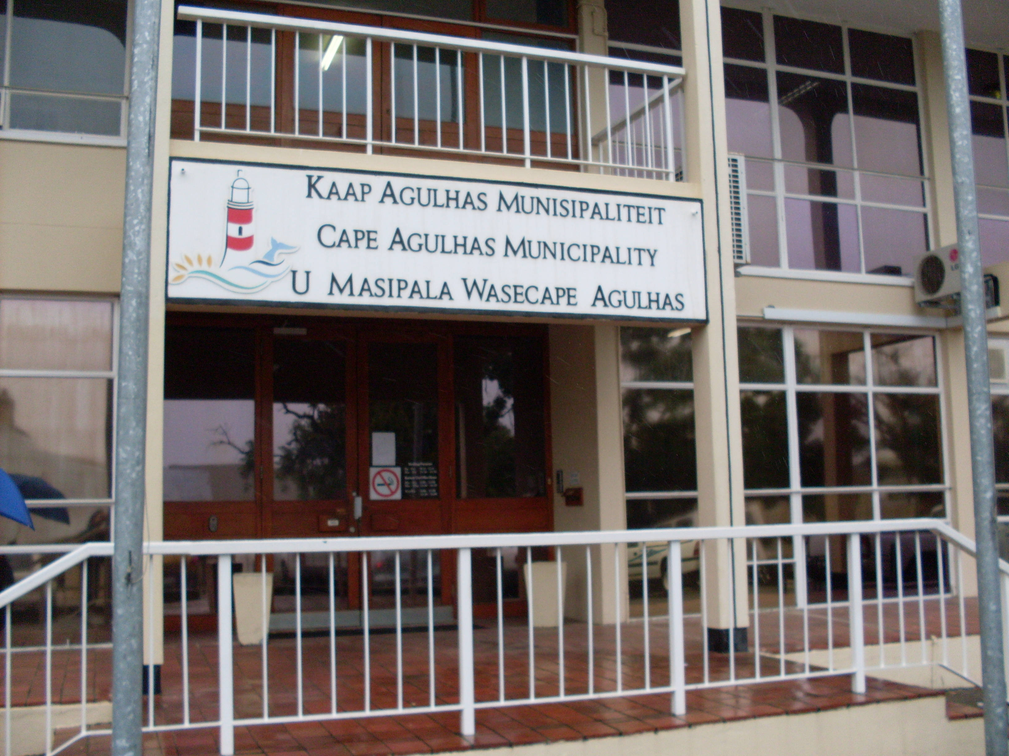 Die ingang van Kaap Agulhas Munisipaliteit se hoofkwartier, wat in Bredasdorp geleë is.